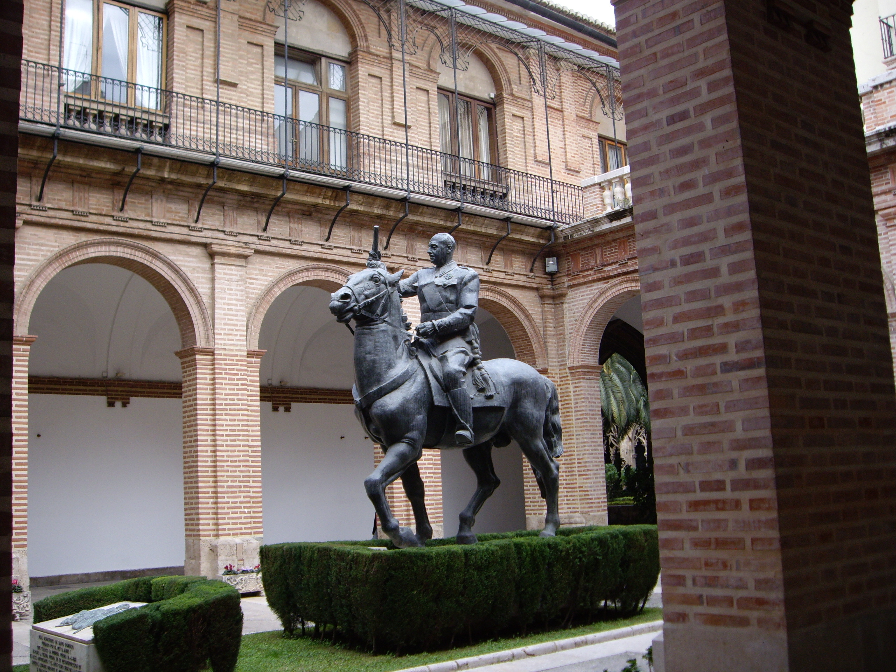 Estàtua eqüestre del dictador Francisco Franco, anteriorment a la Plaça de l'Ajuntament ara al Convent de Sant Doménec, seu de capitania General.